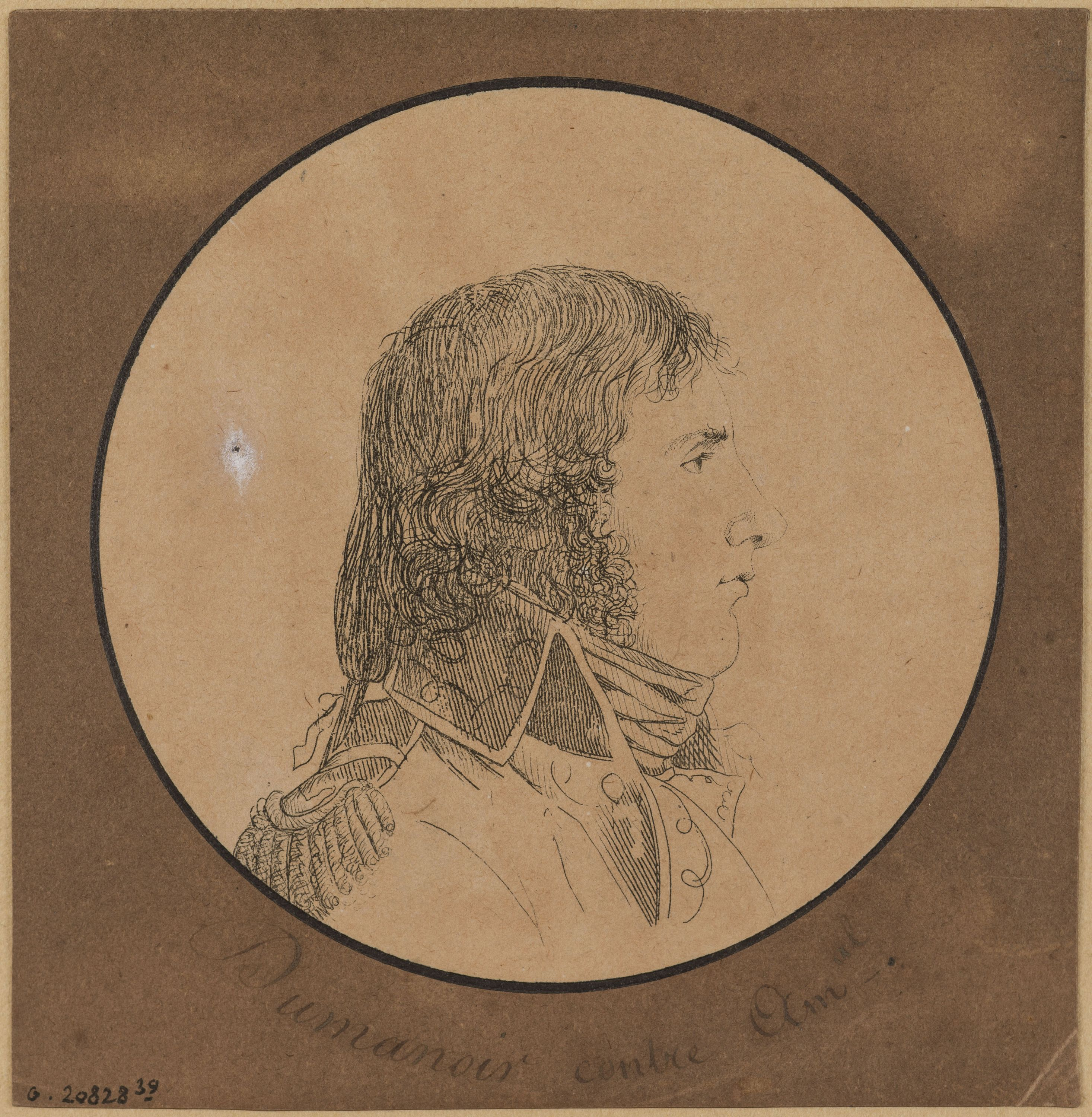 Portrait de Pierre Dumanoir Le Pelley (1770-1829), vice-amiral